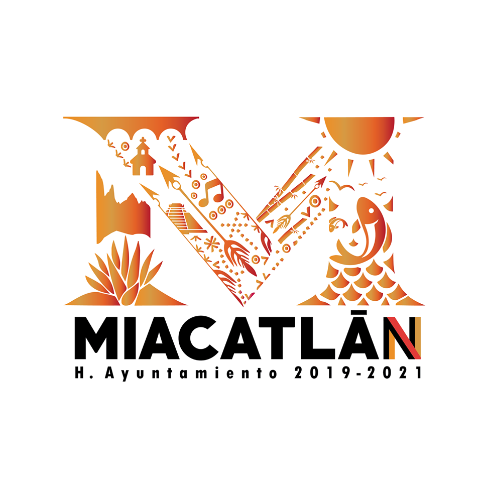 Logo de la admintracion municipal de Miacatlán 2019-2021